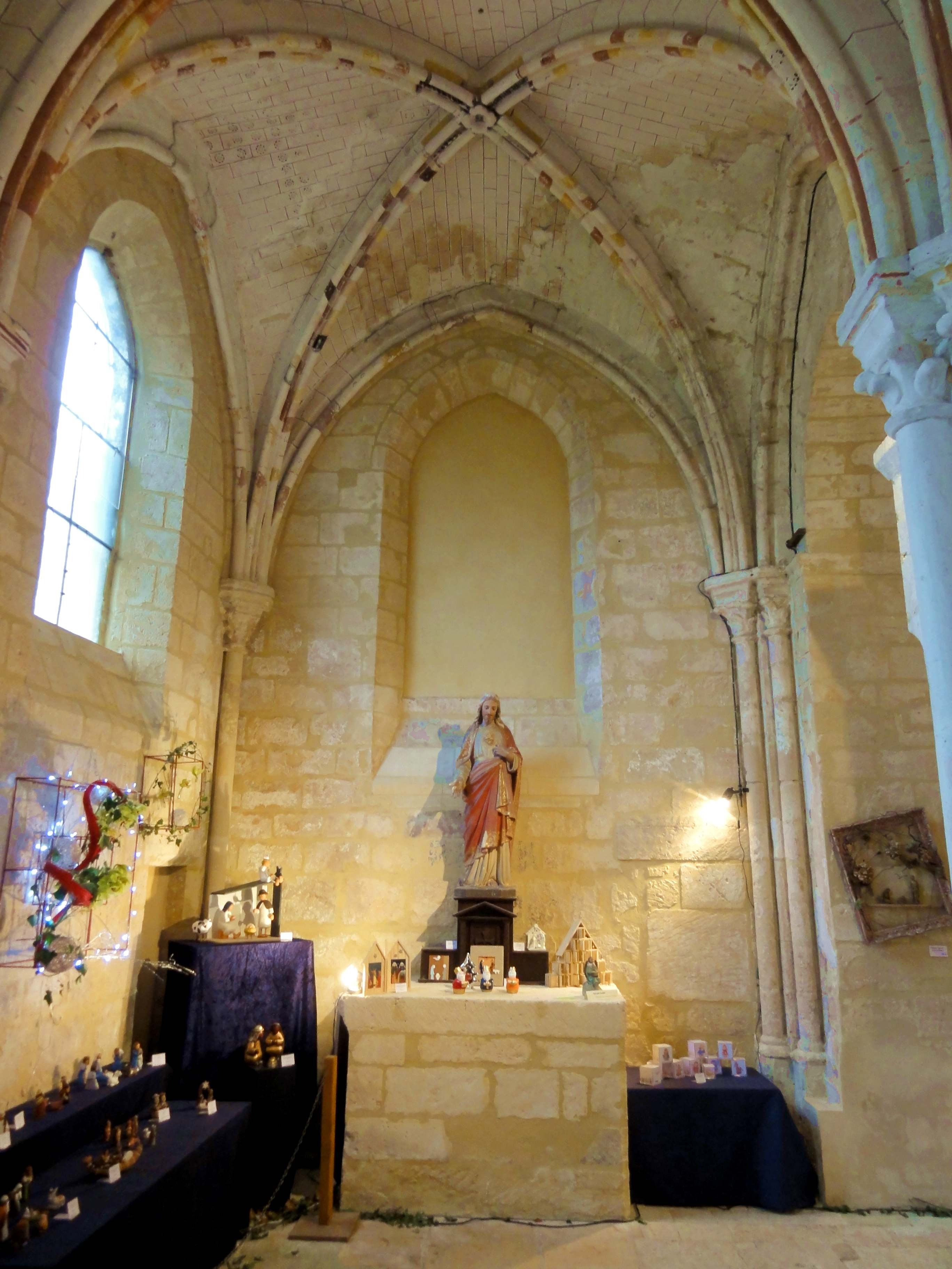 Chapelle nord, vue vers l'est.